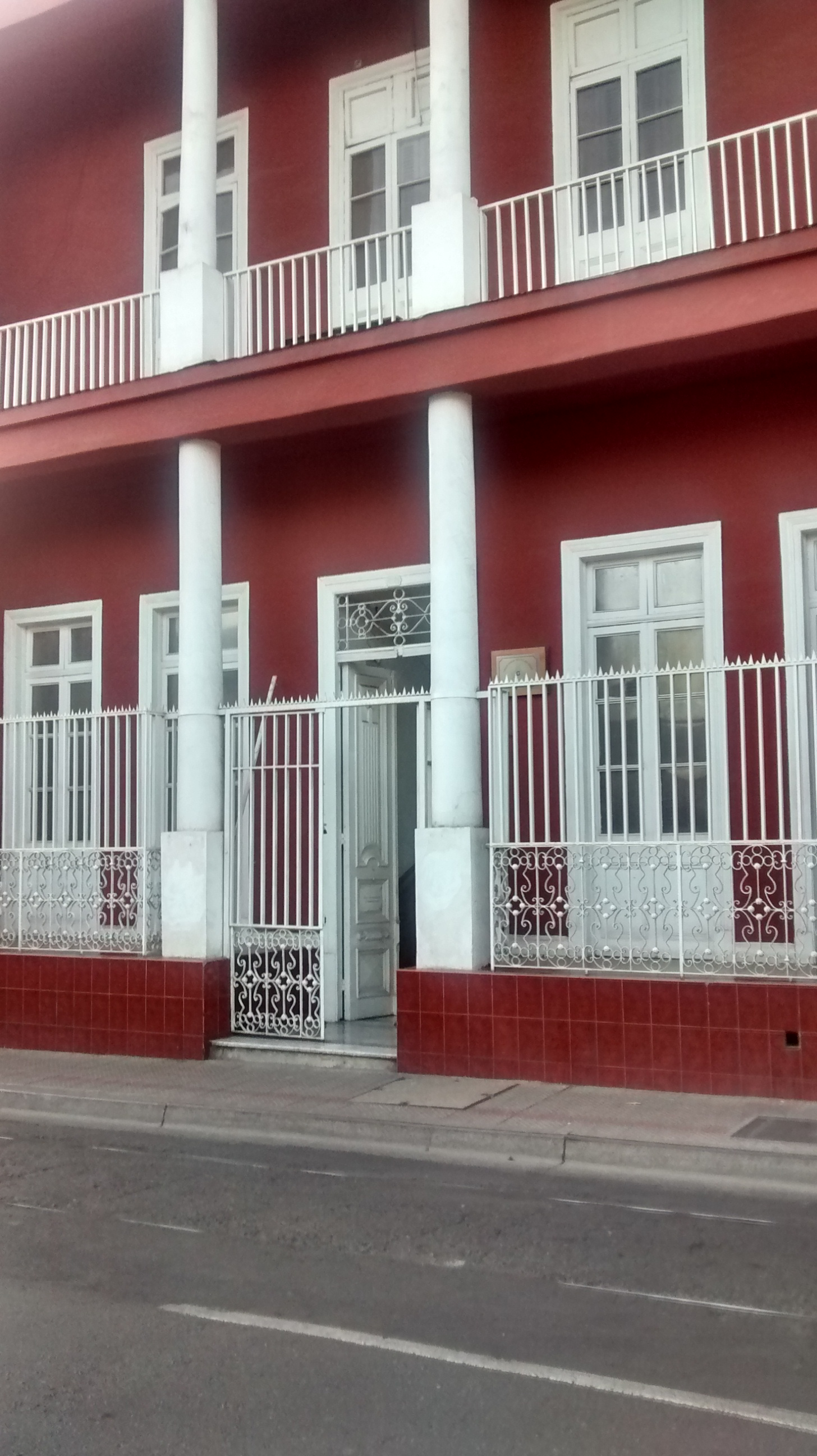 Catedral 2091